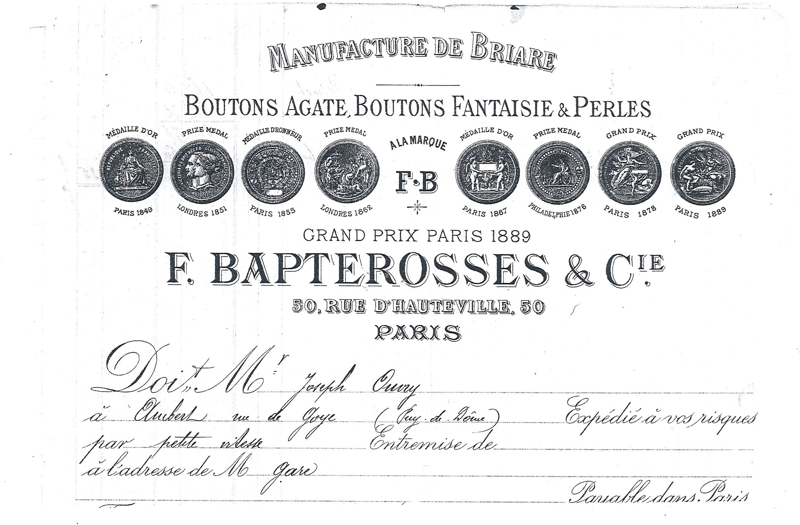 Grand Prix décerné lors de l'exposition universelle de 1889 à Paris à Bapterosses & Cie / émaux de Briare